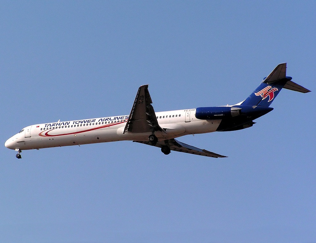 MD-82 (TC-TTA) in Tel Aviv Ben Gurion (20.07.2006)